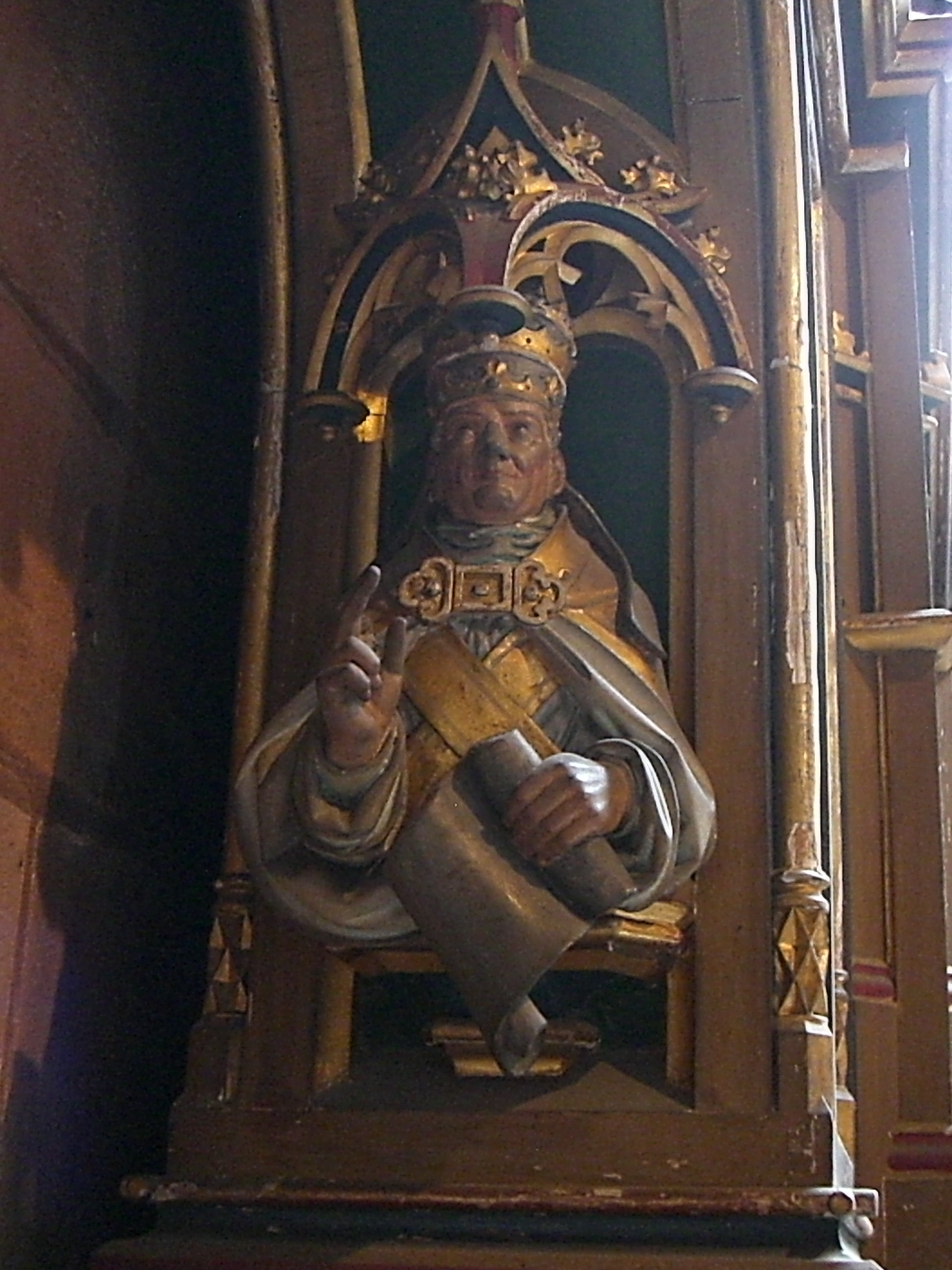 Papst Pius IX. mit der Bulle Ineffabilis Deus auf dem neugotischen Marienaltar im Freiburger Münster (Marmon, Sigmaringen, 1875.).